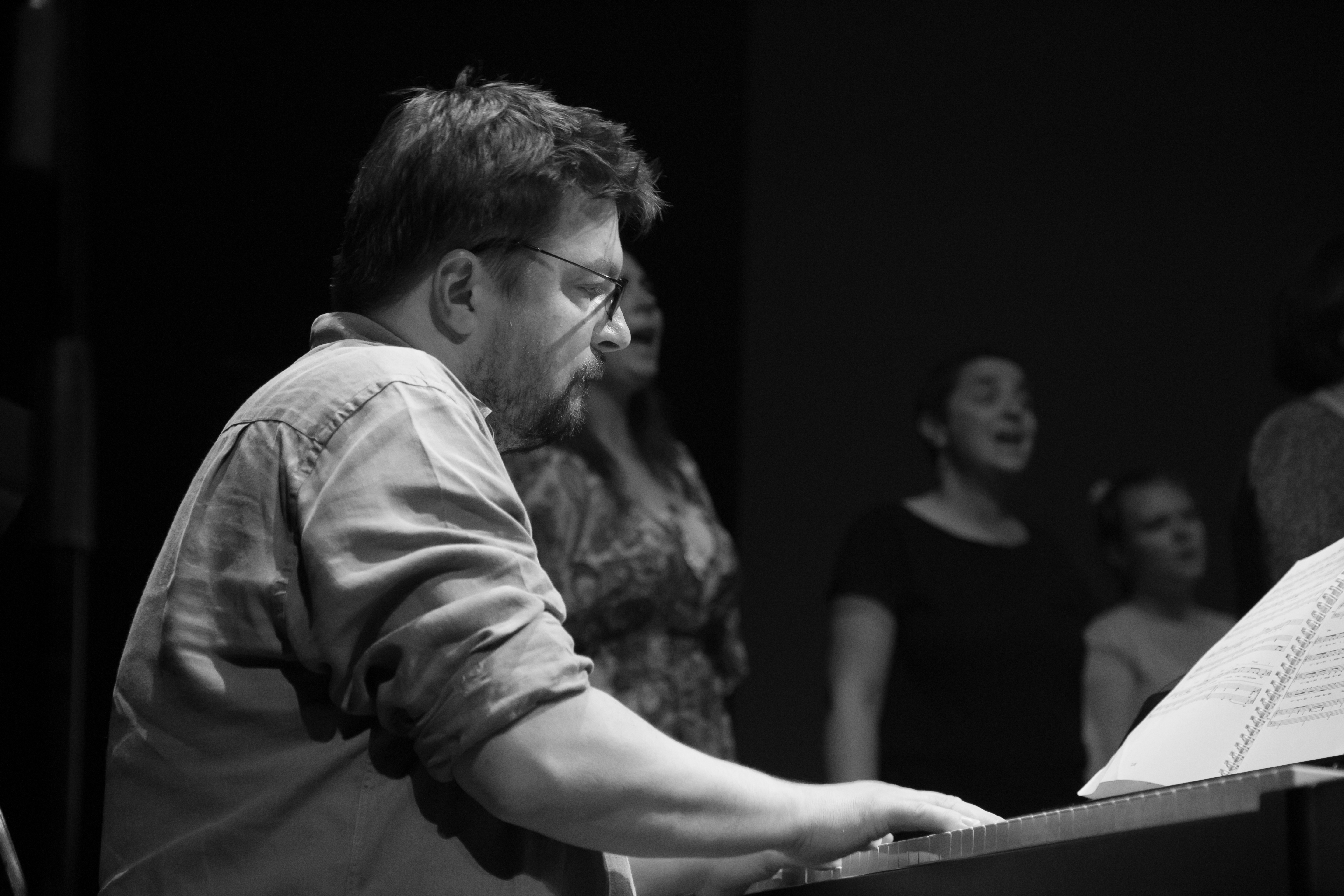 Le compositeur Julien Joubert en concert